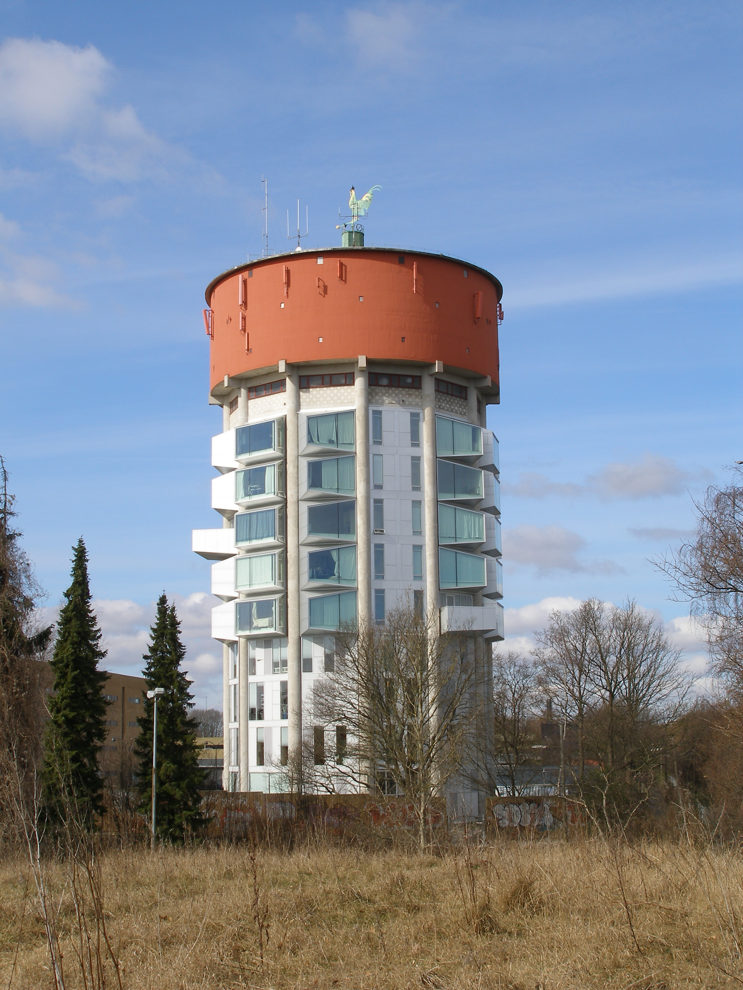 Jægersborg Vandtårn, ved Jægersborg Station, Gentofte Kommune